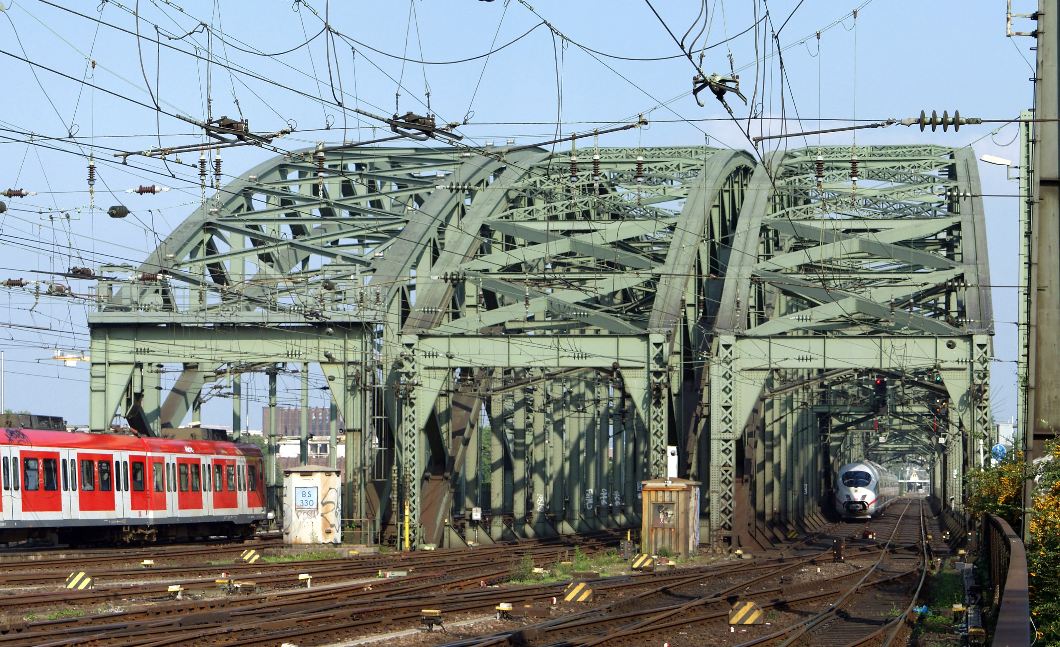 Einfahrt von Westen (Fahrtrichtung Osten) in die Hohenzollernbrücke, Köln